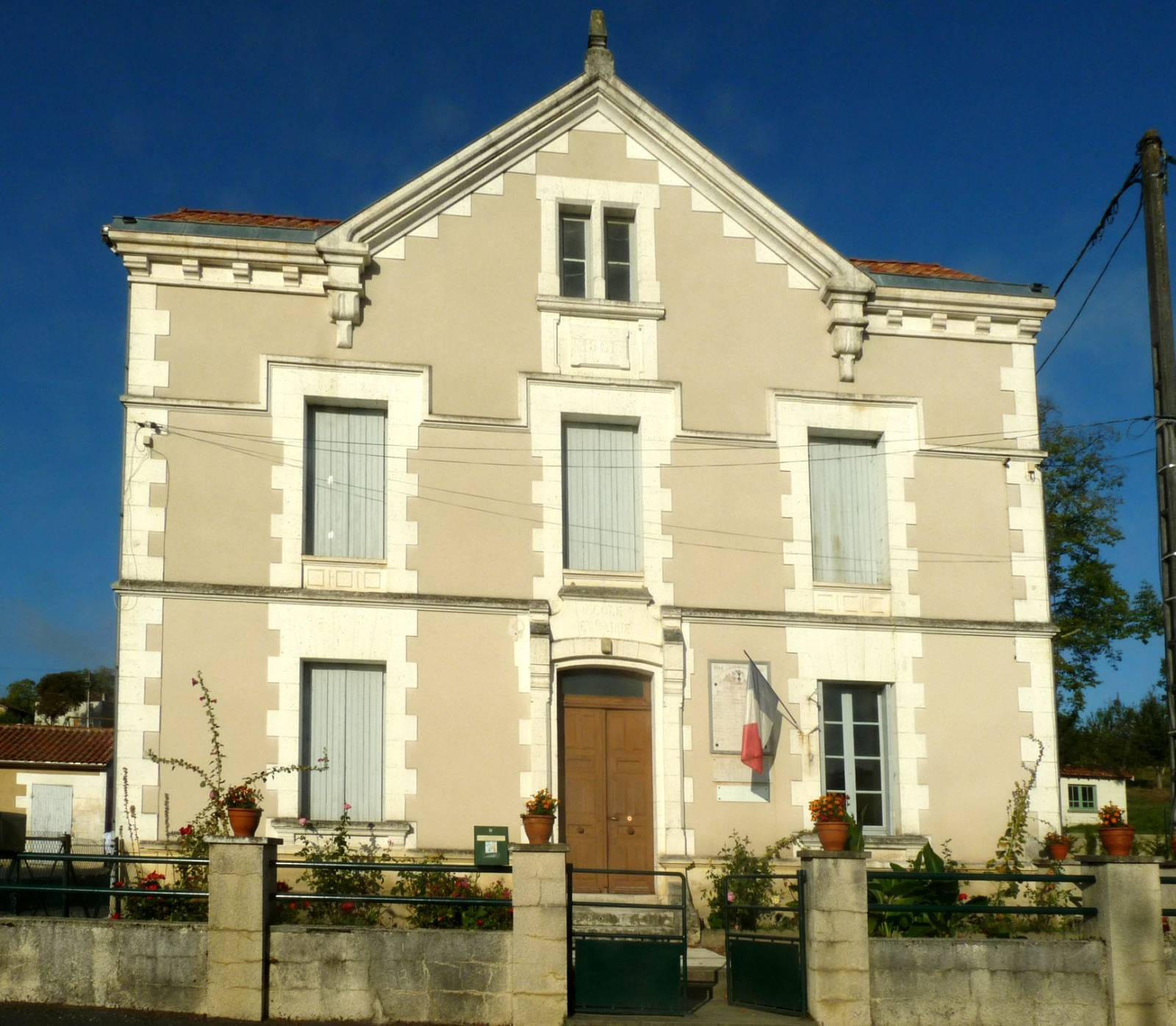 mairie de Boresse-et-Martron (17), France